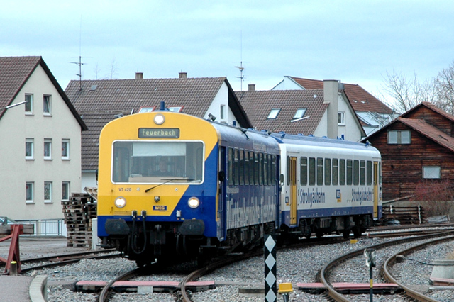 WEG trein VT 420 op 15 februari 2006 te Münchingen